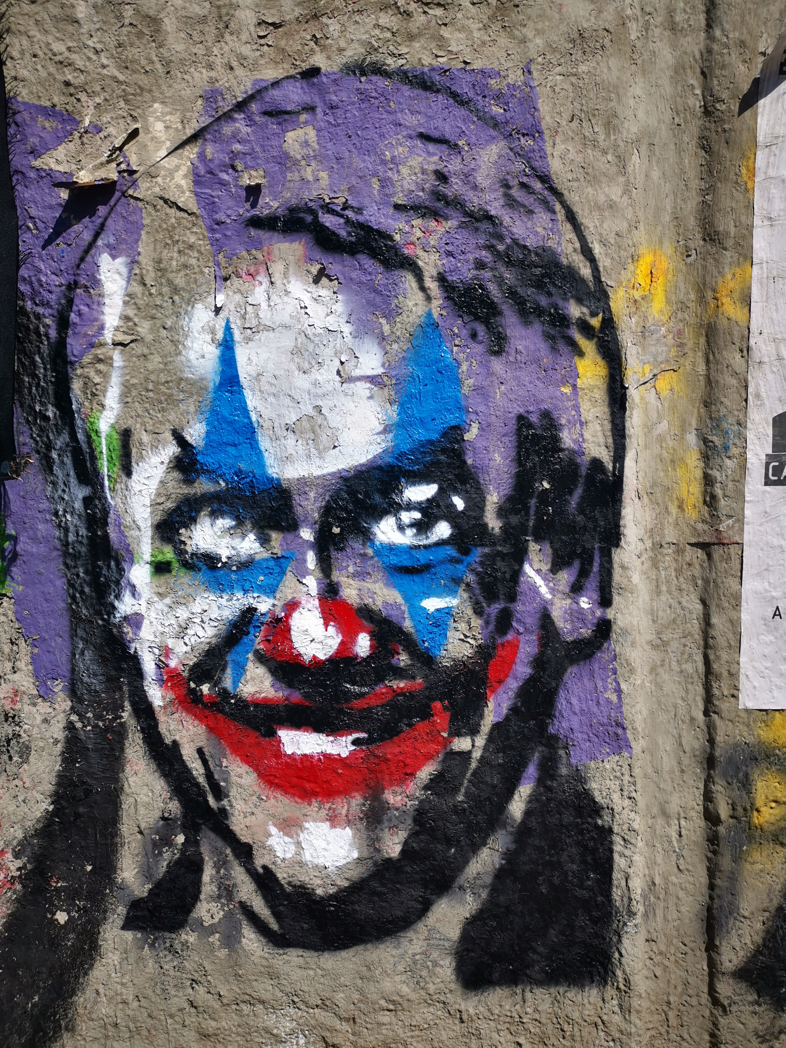 Stencil de Sebastián Piñera como el Joker, pintado fuera de la casa central de la Universidad Católica en Santiago, durante las protestas de 2019.